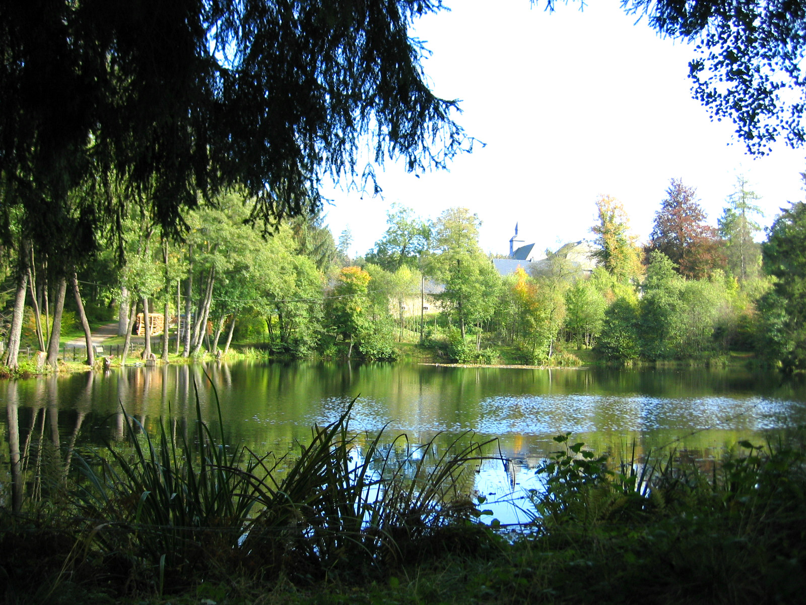 Gut_Reichenstein, Eifel